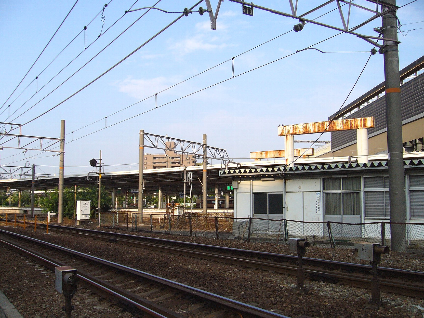 阪急新大阪連絡線の遺構 JR西日本新大阪駅内に残る鉄骨橋脚 手前の線路はja:北方貨物線